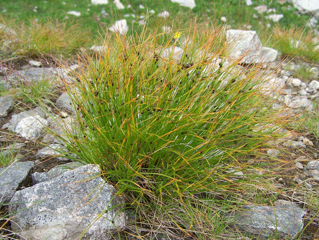 Juncus trifidus (pl. sit skucina)